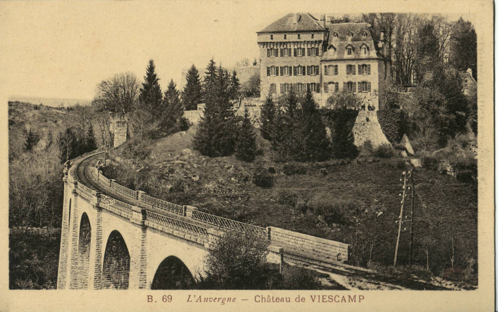 Carte postale ancienne éditée par MADOUX, collection 'L'Auvergne n°B69 : Château de Viescamp